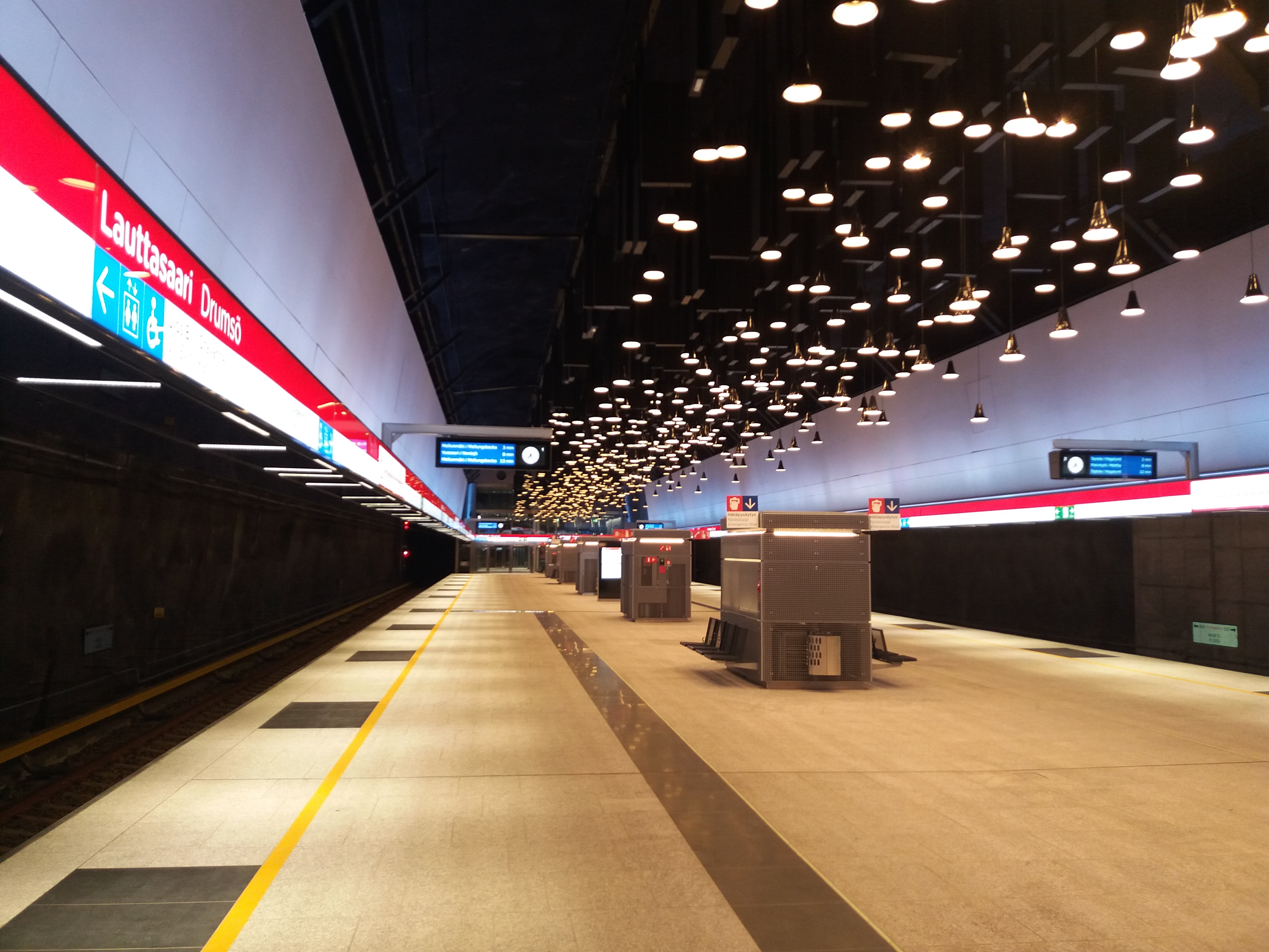 Lauttasaaren metroasema avajaispäivänään.